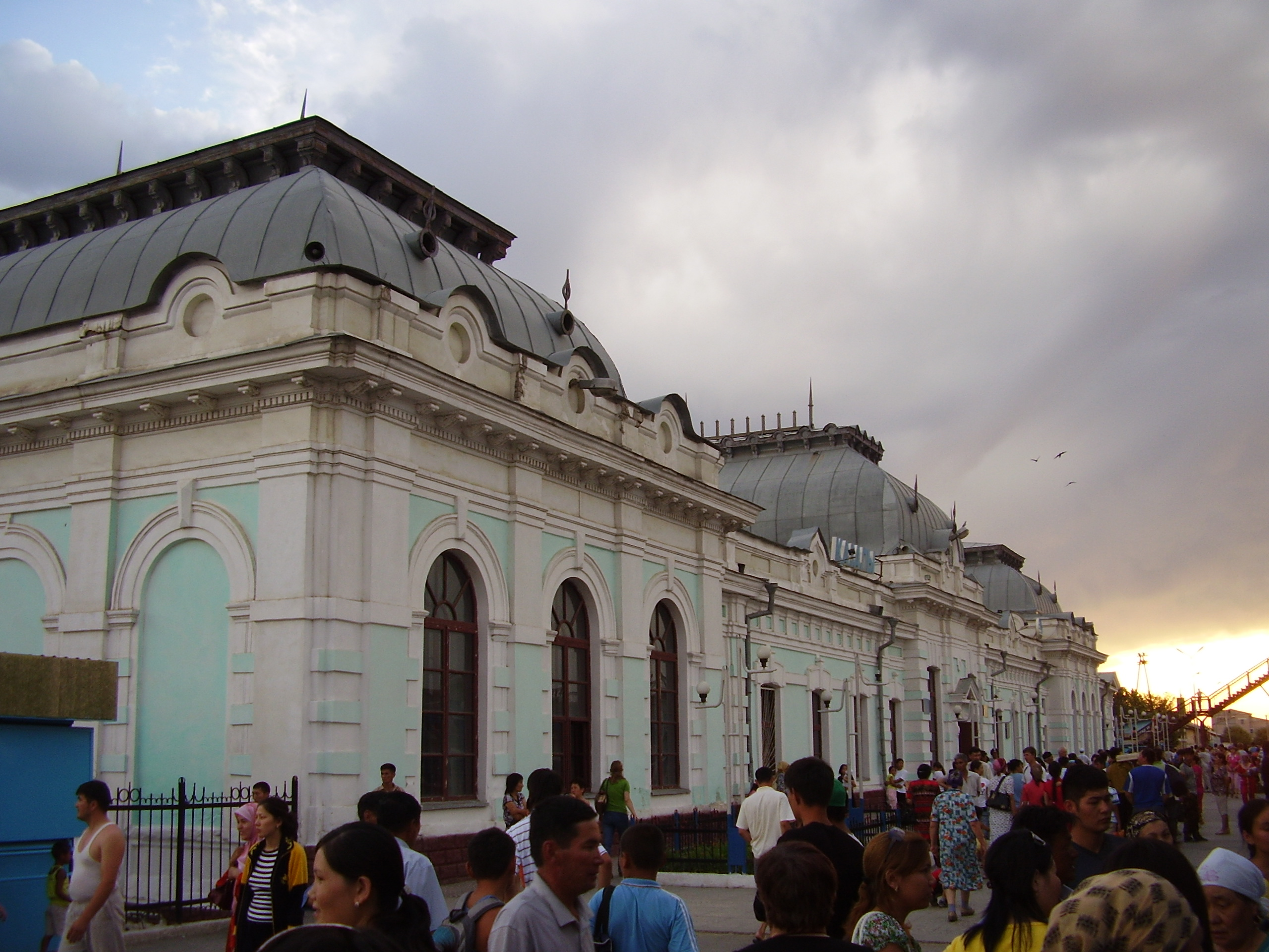 Вокзал железнодорожной станции Казалы. Посёлок Айтеке-Би Казалинского района Кызылординской области Казахстана.